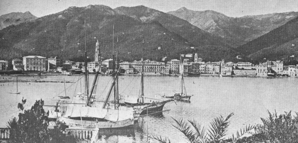 Panorama di inizio XX secolo del litorale di Rapallo, Liguria, Italia